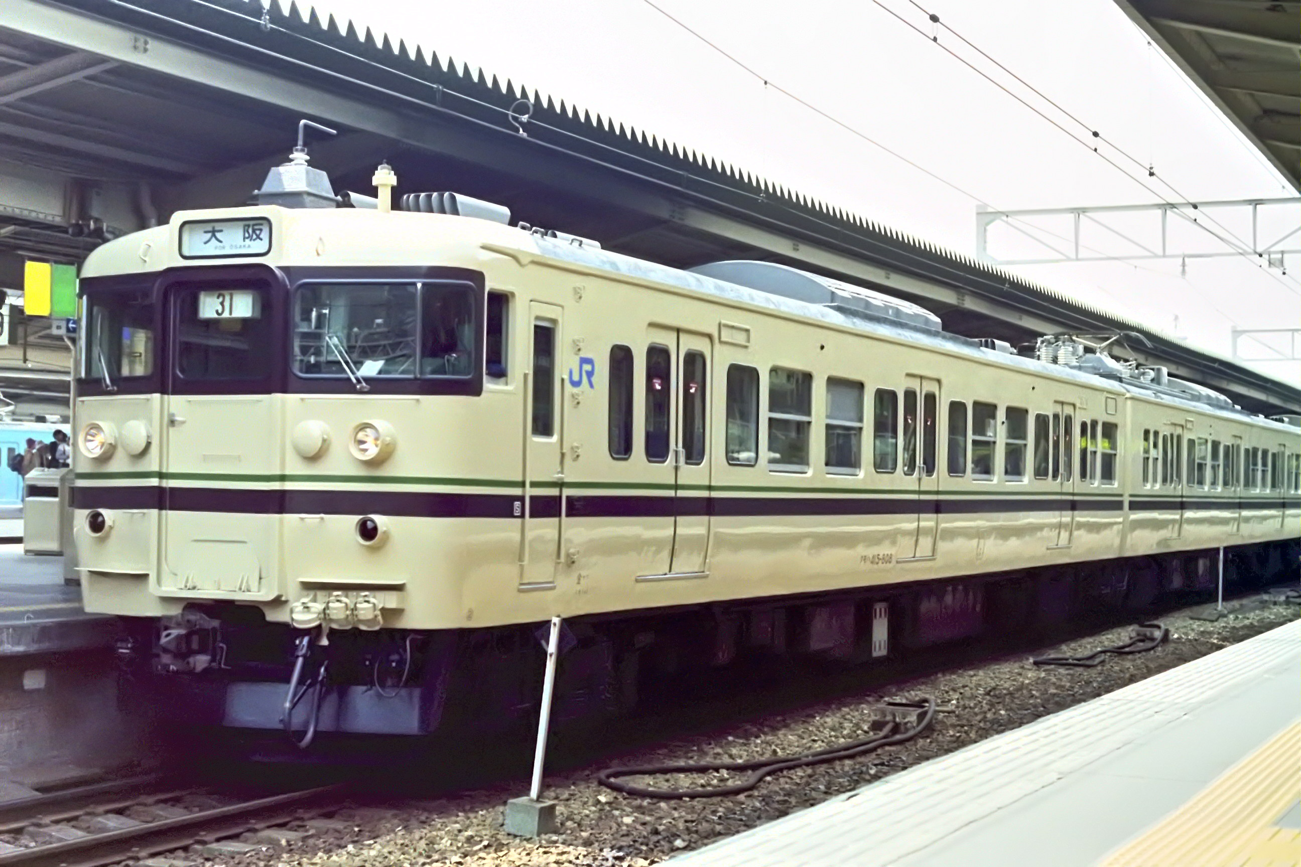 福知山線で使用されていた415系800番台